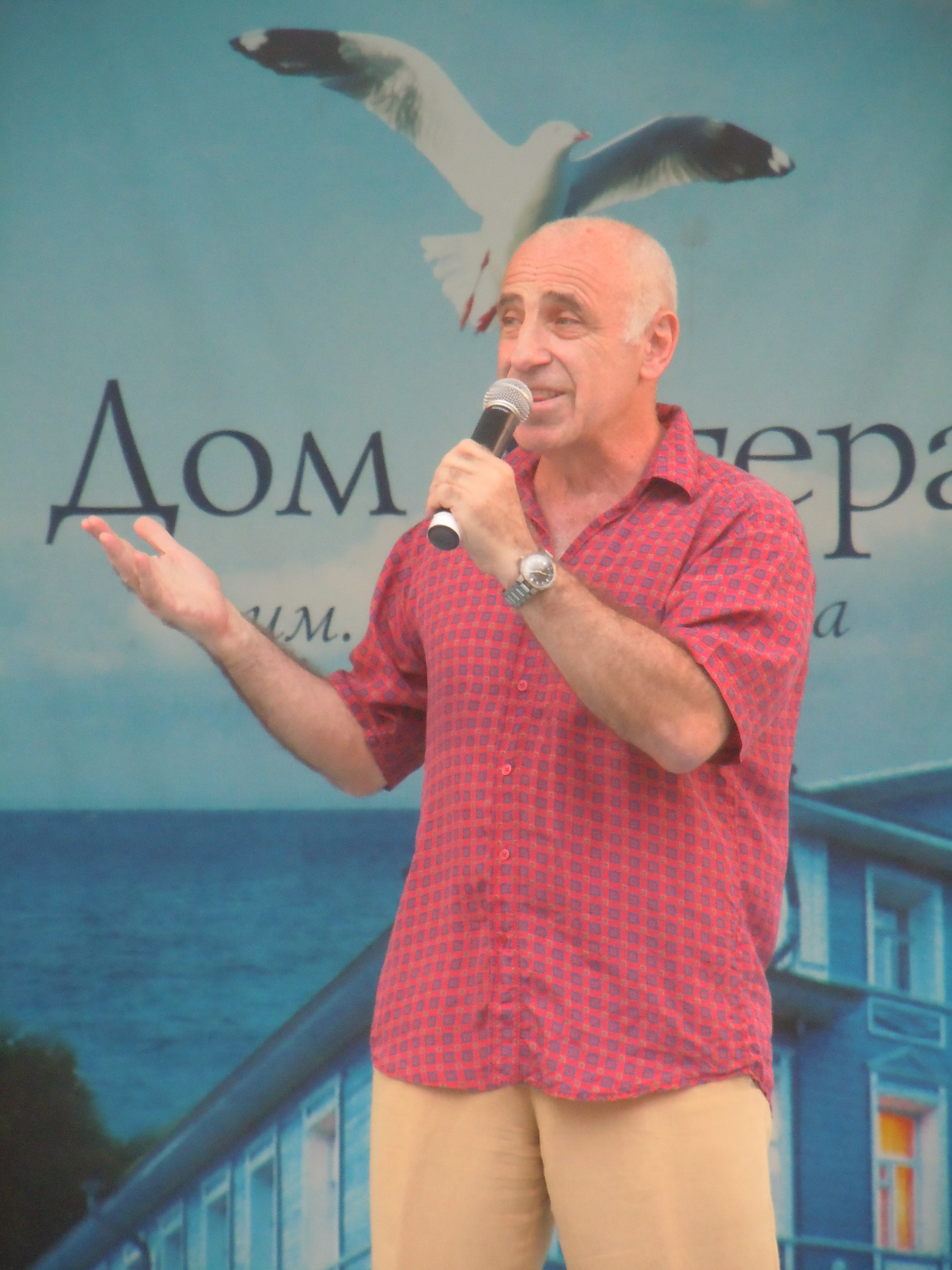 Концерт в Вологде, 2012